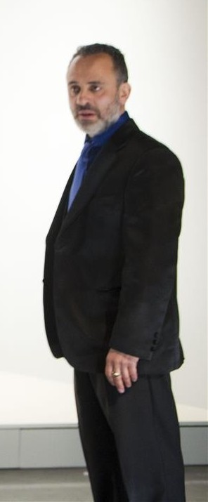 Antigua Universidad Renacentista 18-19 julio 22.45h. Los Mácbez Cía: Los Mácbez Madrid D: 120 min. P: 20€, 25€ y 27€